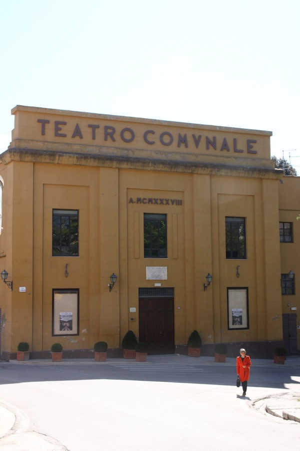 Teatro Comunale Chiusi